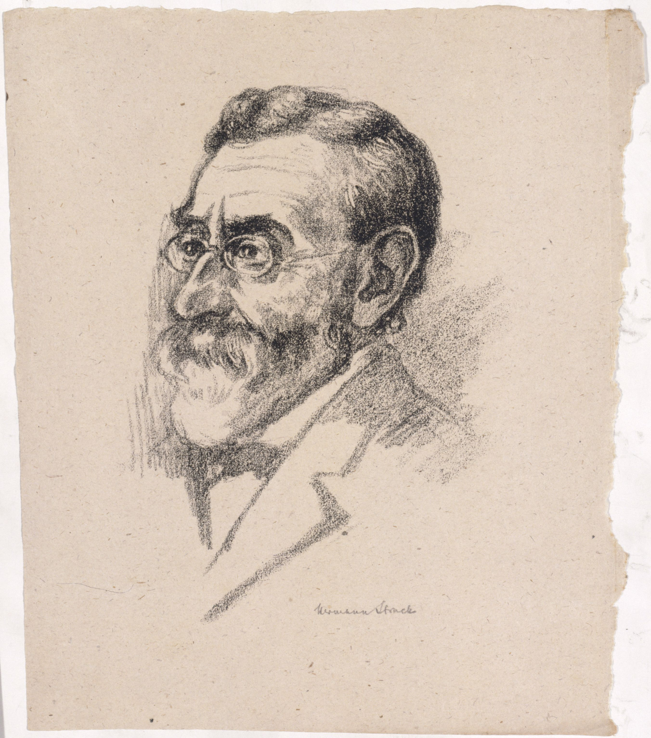 Artwork by Hermann Struck Dargestellte Person: Berliner, Abraham (1833 - 1915), DNB-Link Datierung Display: ca. 1920 - 1925 Objektart: Lithografie Schlagworte Inhalt /Geografie: Mann, Porträt, Brille, Kleidung, alter Mensch Schlagworte Kontext: Rabbiner